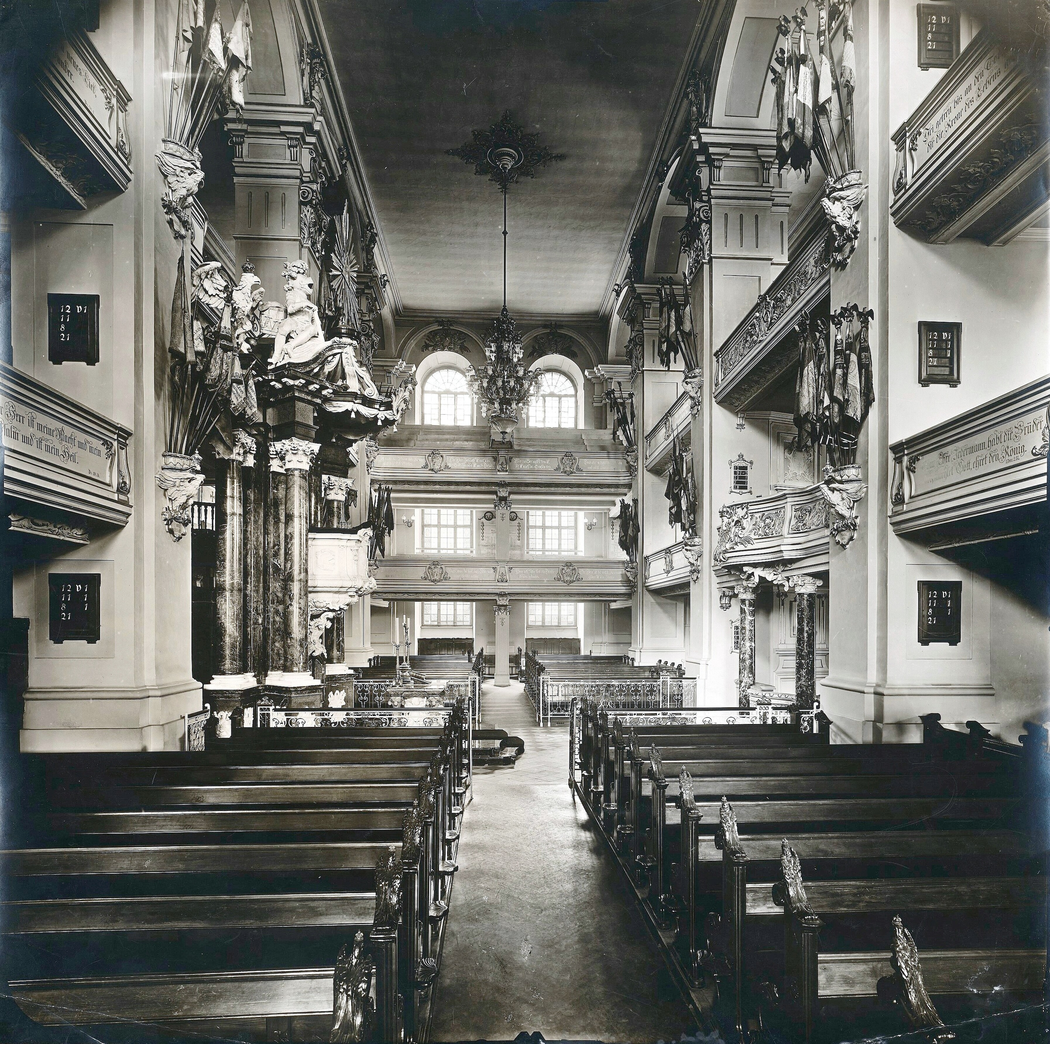 Garnisonkirche Potsdam, Innenraum